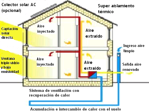 Esquema en corte indicando algunos elementos de una casa pasiva.